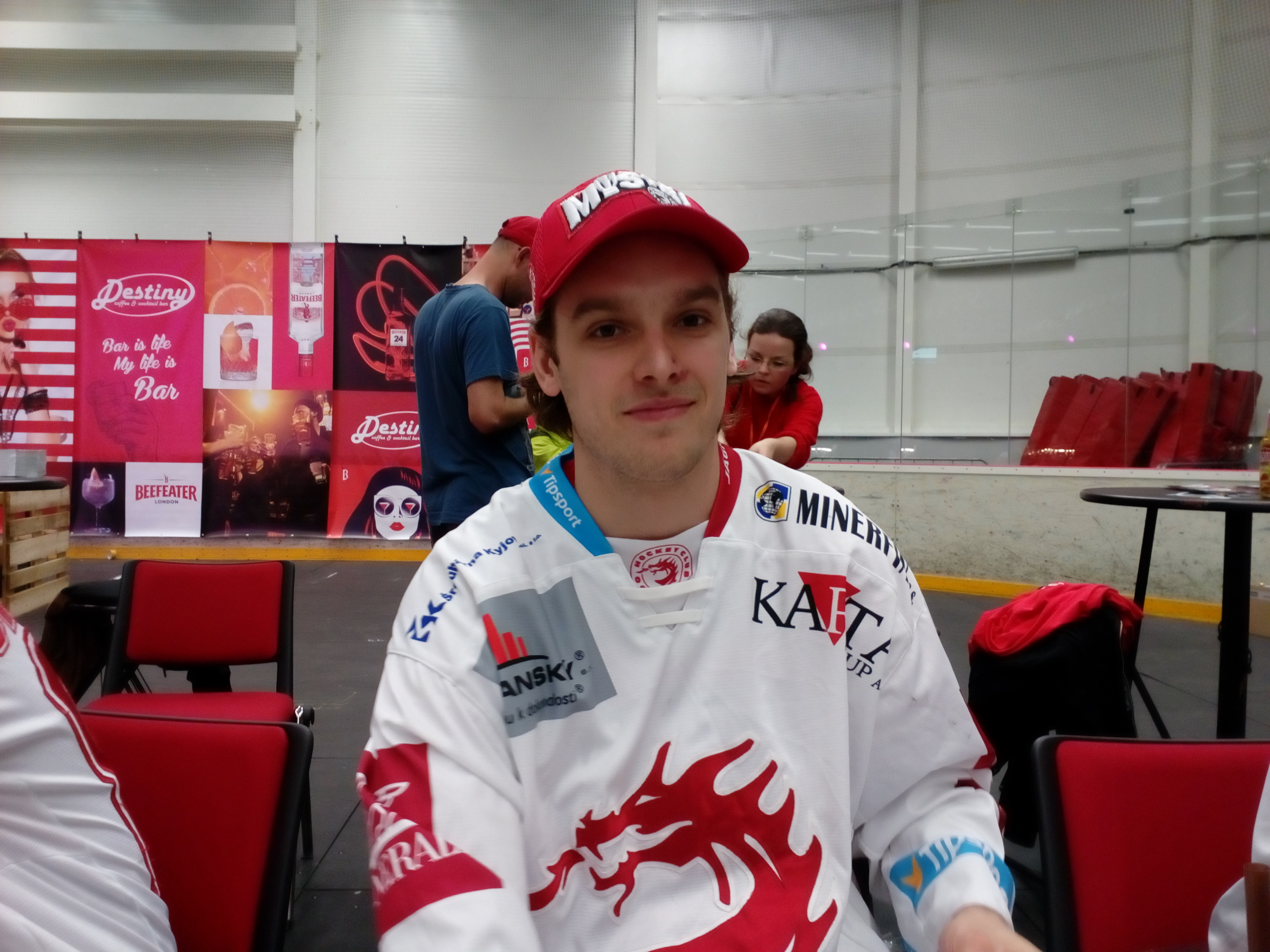 Po zakončení sezóny 2018/19 na autogramiádě v malé (tréningové) Werk Areně